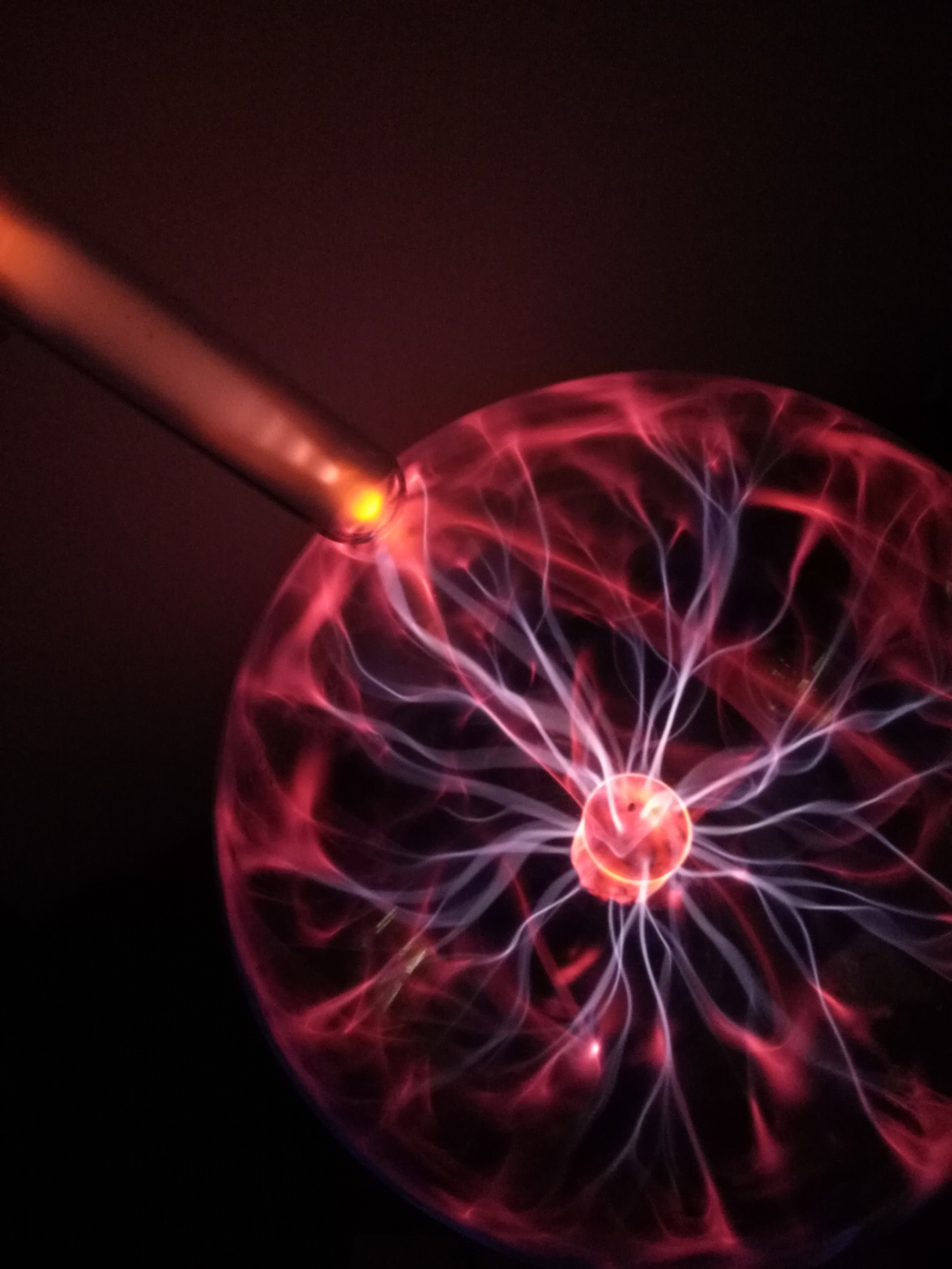 一支元素收藏爱好者收藏的玻封氖气在辉光球的作用下，发出橙色光芒。